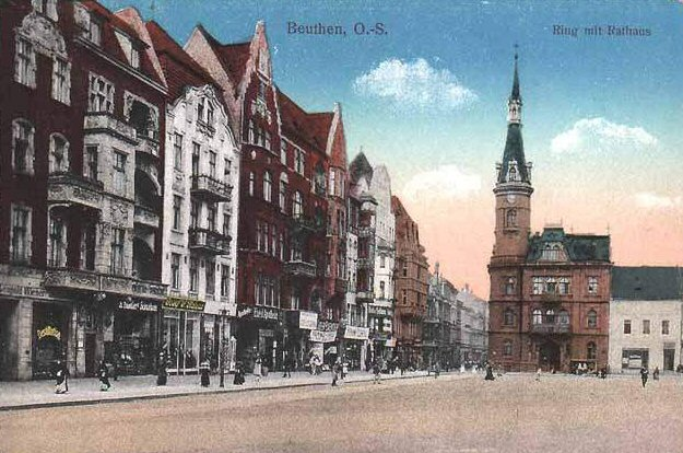 Rynek - pocztówka z ok. 1925 r.